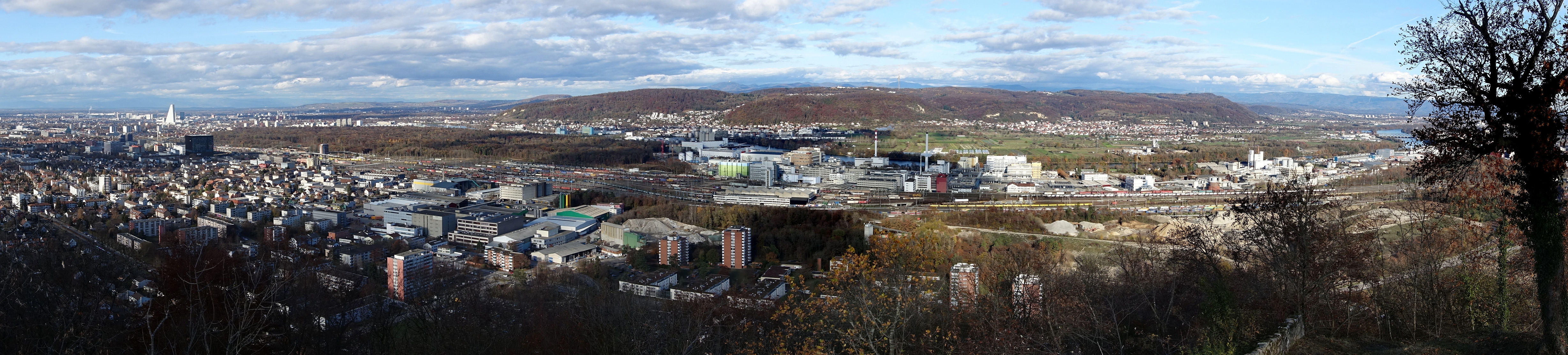 Panorama Blick von der vorderen Wartenberg Ruine nach Muttenz, Basel, Schweizerhalle, Augst, Kraftwerk